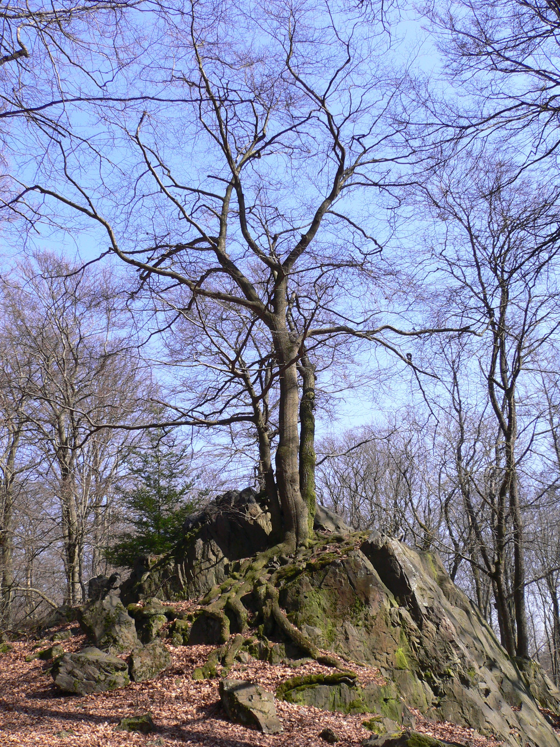 Wilhelmsteine: Drei Bäume, die auf einem Felsen wachsen